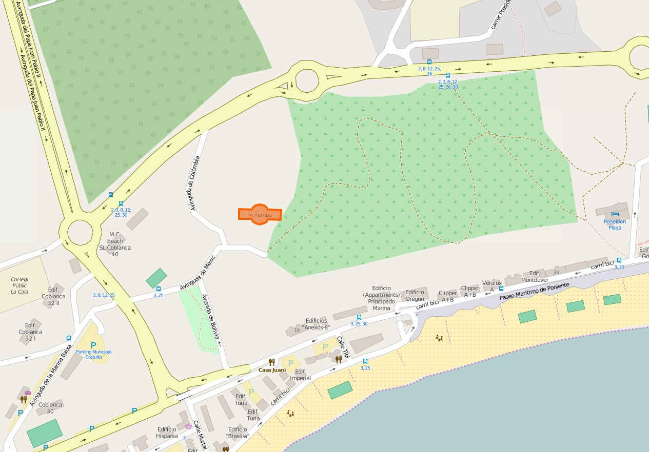 Mapa de la localización del rascacielos Intempo en la Playa de Poniente (Benidorm) This map may be incomplete, and may contain errors. Don't rely solely on it for navigation.